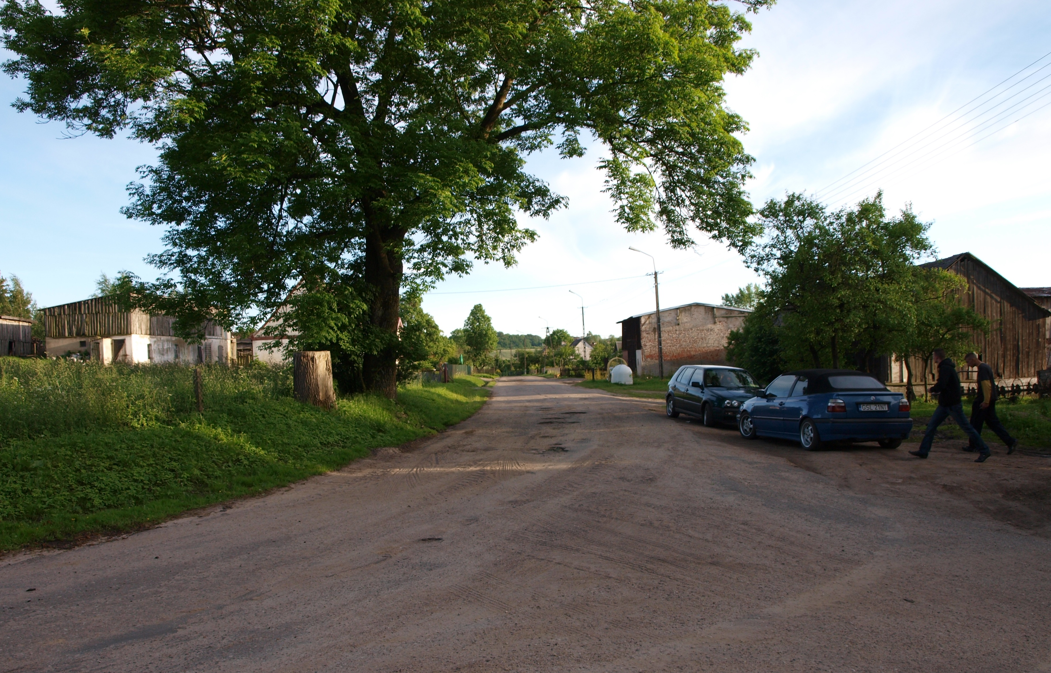 Rzuszcze w gminie Główczyce.